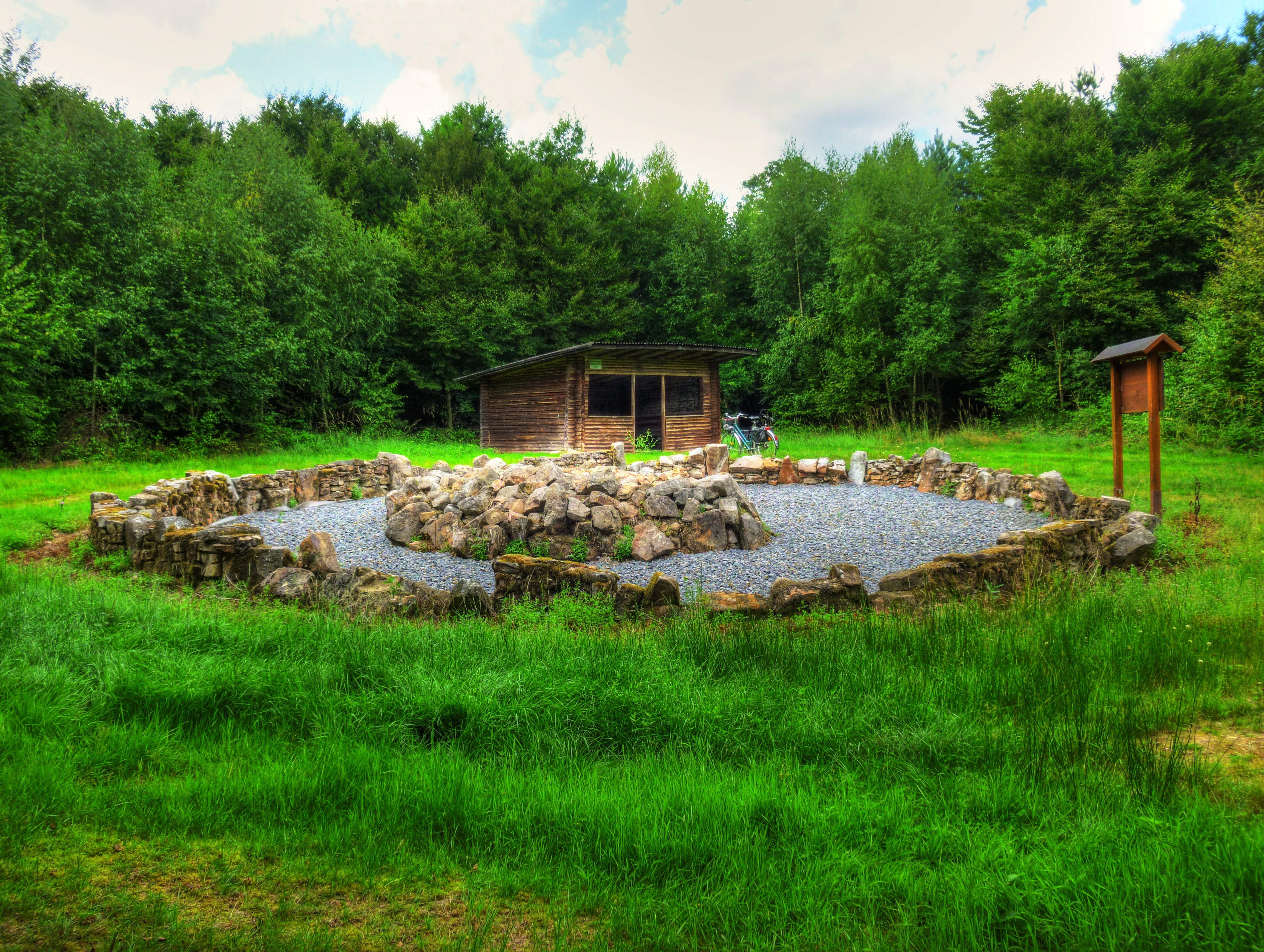 Das Hügelgrab von Wiera (Schwalmstadt)